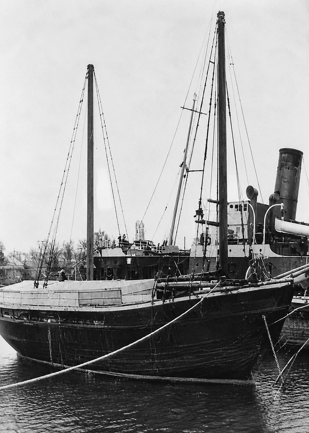 אניית המעפילים סלבדור